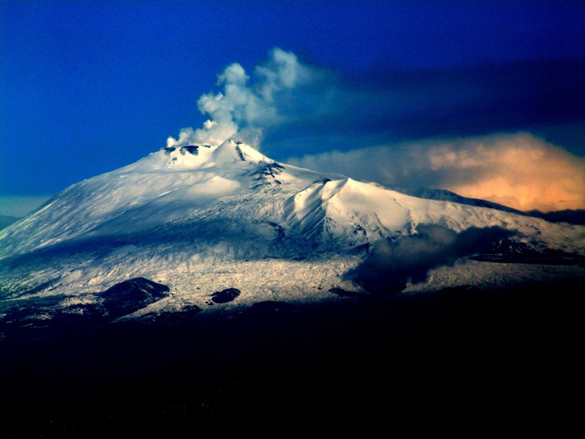 Etna des de l'avió